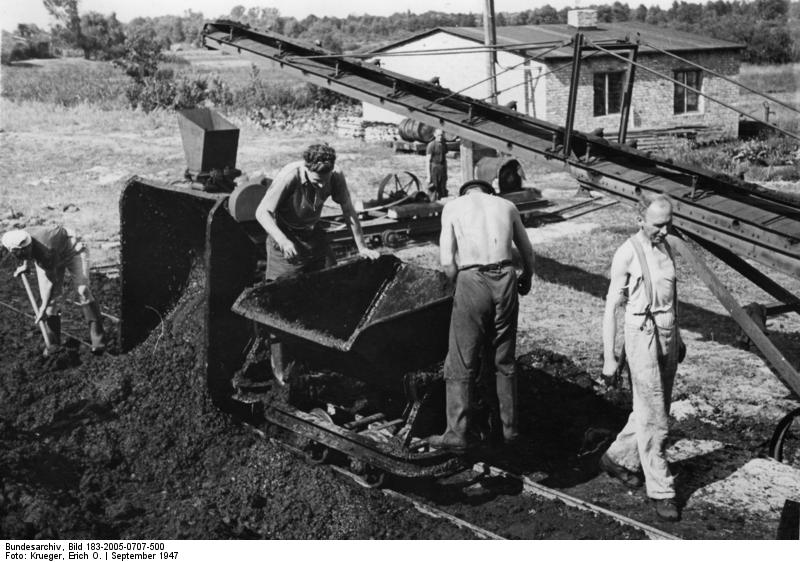 Berlin-Spandau, Torfabbau Torfvorkommen bei Spandau. Stapelung des gewonnenen Torfes zur weiteren Bearbeitung. Berlin, September 1947 Aufn.: E.O. Krueger 838-47